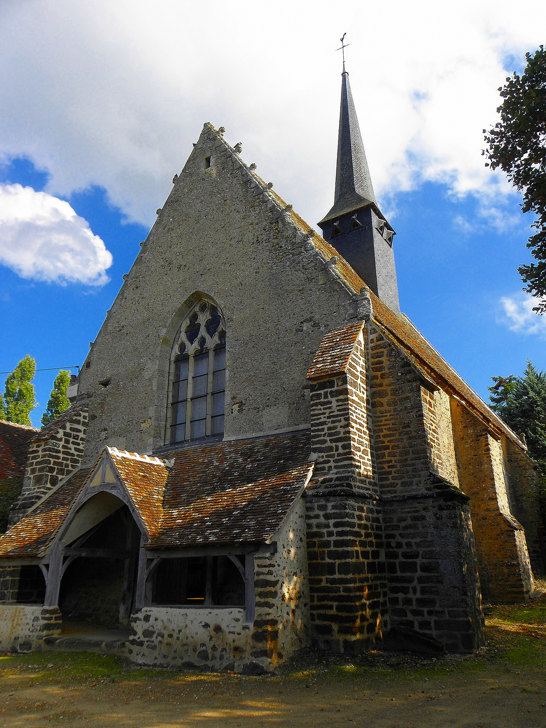 Église Saint-Martin de Sargé-sur-Braye (41). Façade occidentale.